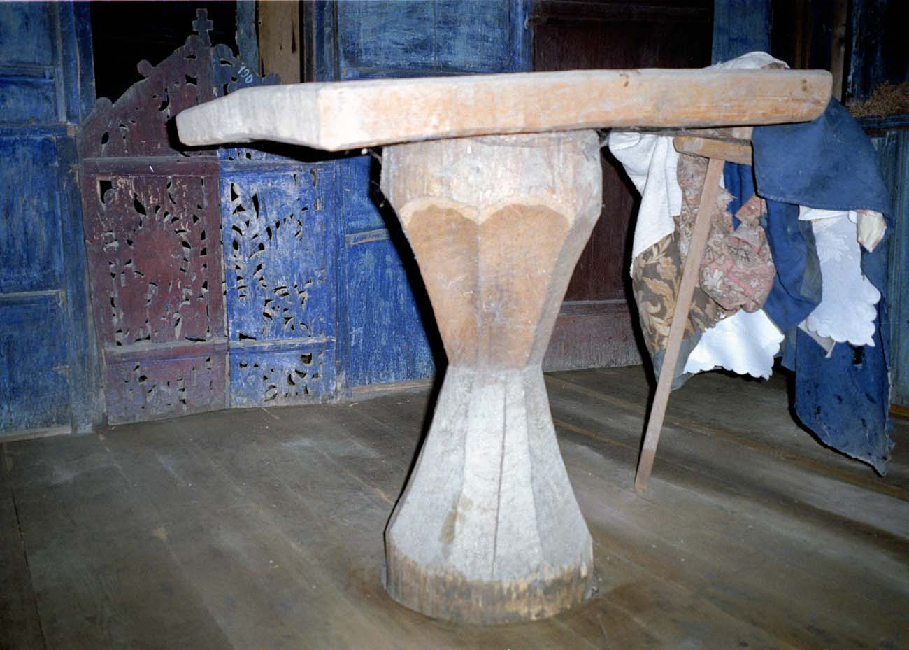 Miroslovești, Iași: biserica de lemn. Masa altarului.